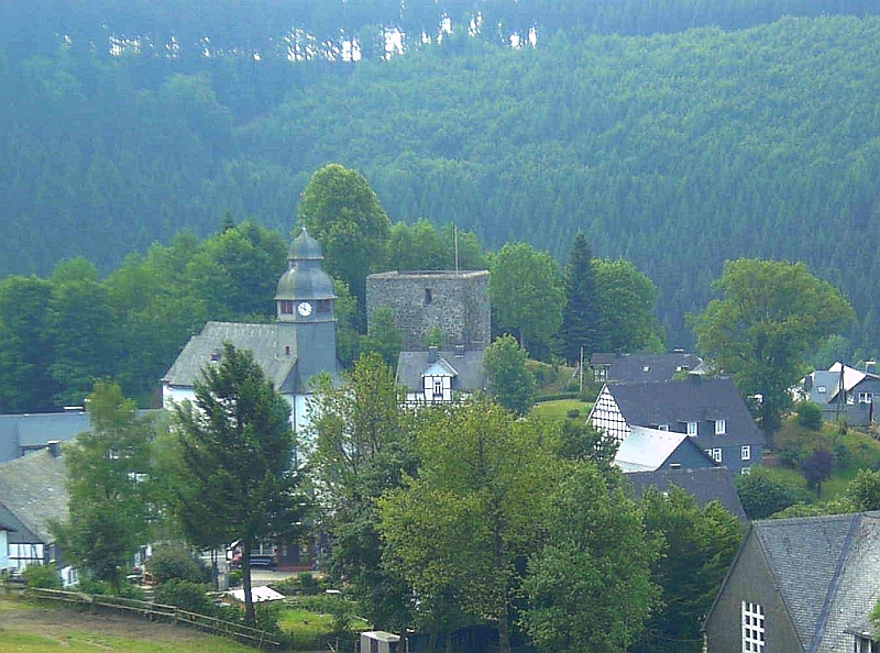 Burgruine Nordenau (Schmallenberg), Germany.